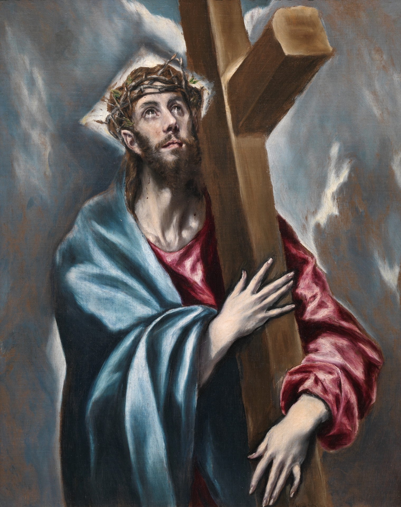 La obra representa a Jesucristo cargando con la cruz en la que sería crucificado y con la vista puesta en el cielo.